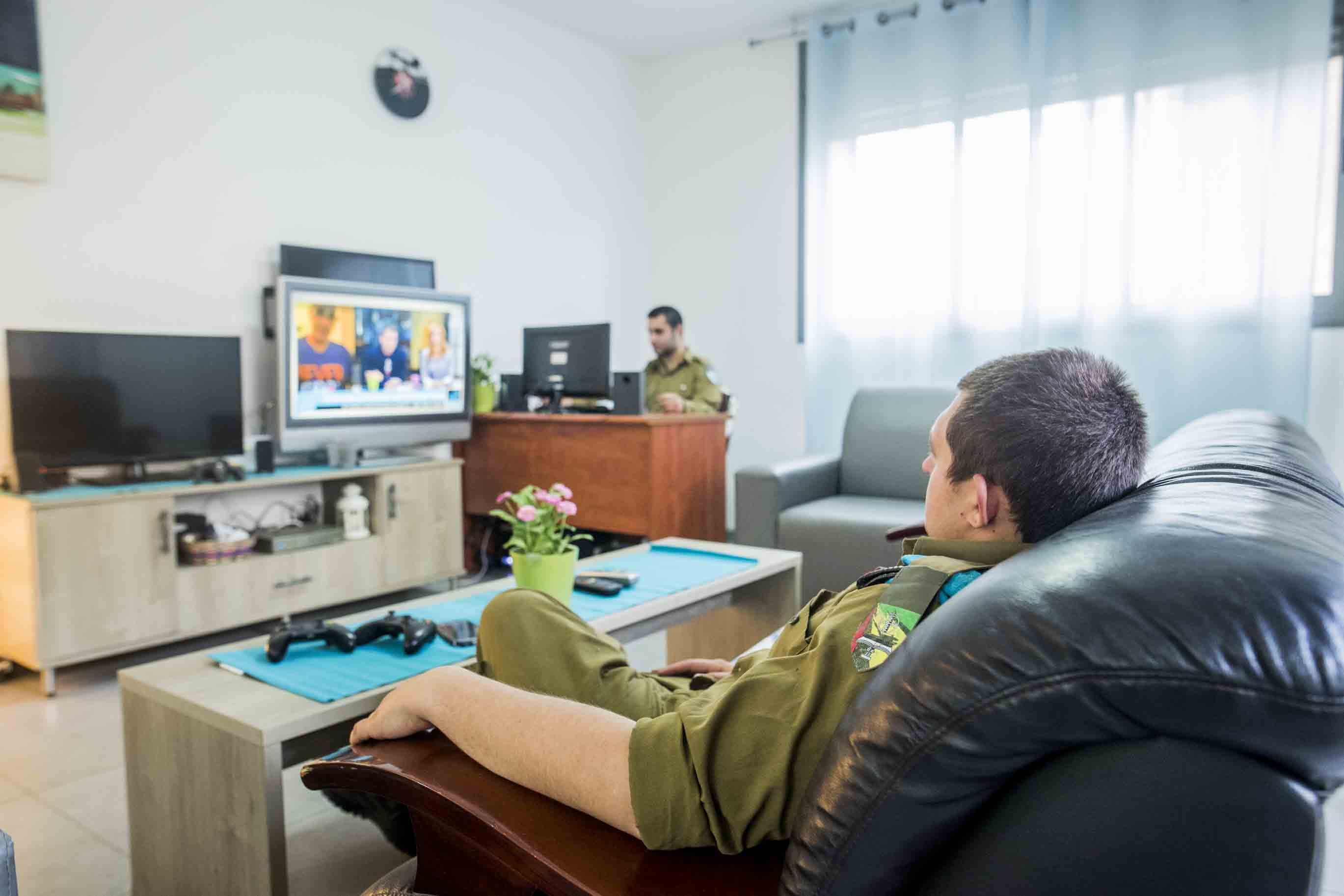 אחת מכ-150 הדירות אותן מחזיקה יחד למען החייל